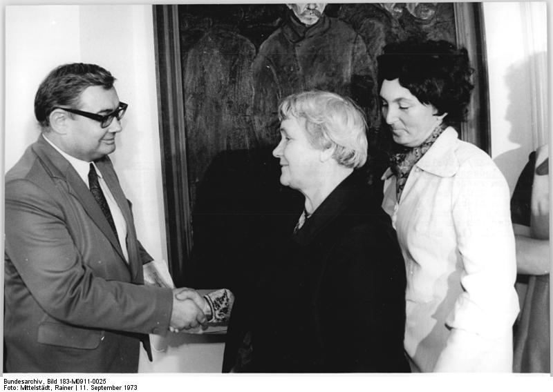 Berlin, Friedenserklärung, Norbert Kraja, Walentina Nagel ADN-ZB Mittelstädt 11.9.73 Berlin: Erklärung zum Weltkongreß der Friedenskräfte- Ihre Unterstützung des nach Moskau einberufenen Weltkongresses der Friedenkräfte bekundeten die Brigade "Otto Nagel" des KWO, die Otto-Nagel-Schule in Berlin-Biesdorf und die Witwe des Künstlers, Wally Nagel (Mitte), am 11.9.73 im Berliner Otto-Nagel-Haus in einer Erklärung. Der Vertreter der Nationalen Arbeitsgruppe der DDR zur Föderung des Weltkongresses der Friedenskräfte Norbert Kraja (l.) nahm anschließend den Aufruf entgegen. Abgebildete Personen: Nagel, Otto Prof.: Maler, Präsident der Akademie der Künste (AdK), Nationalpreisträger, Vaterländischer Verdienstorden (VVO) in Gold, DDR (GND 118586300)